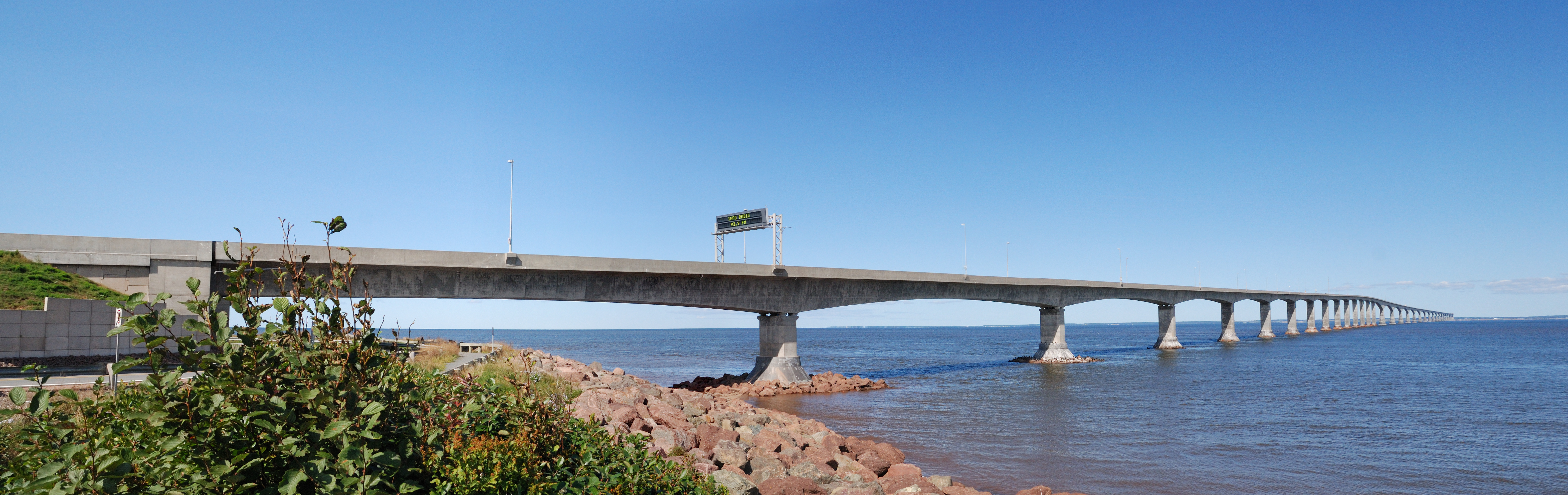 Panorama der Confederation Bridge